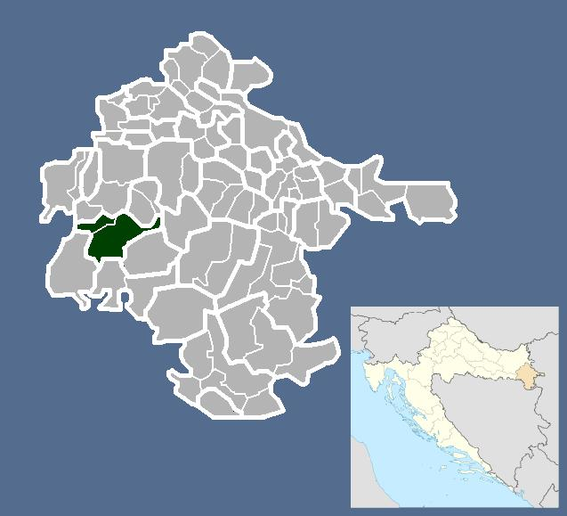 Српски (ћирилица): Општина Церна.